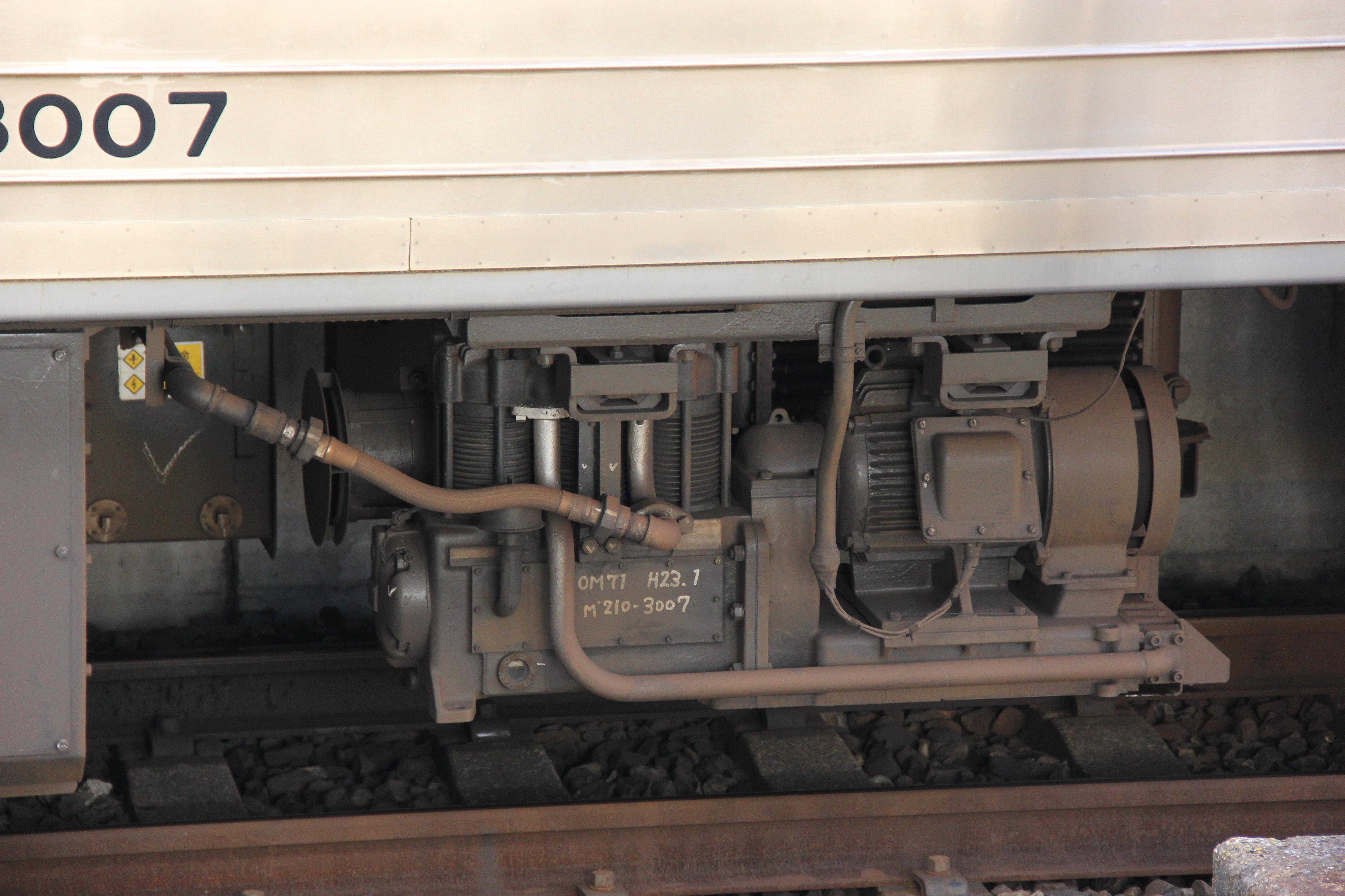 211系 モハ210-3007 電動空気圧縮機（2012年8月22日）